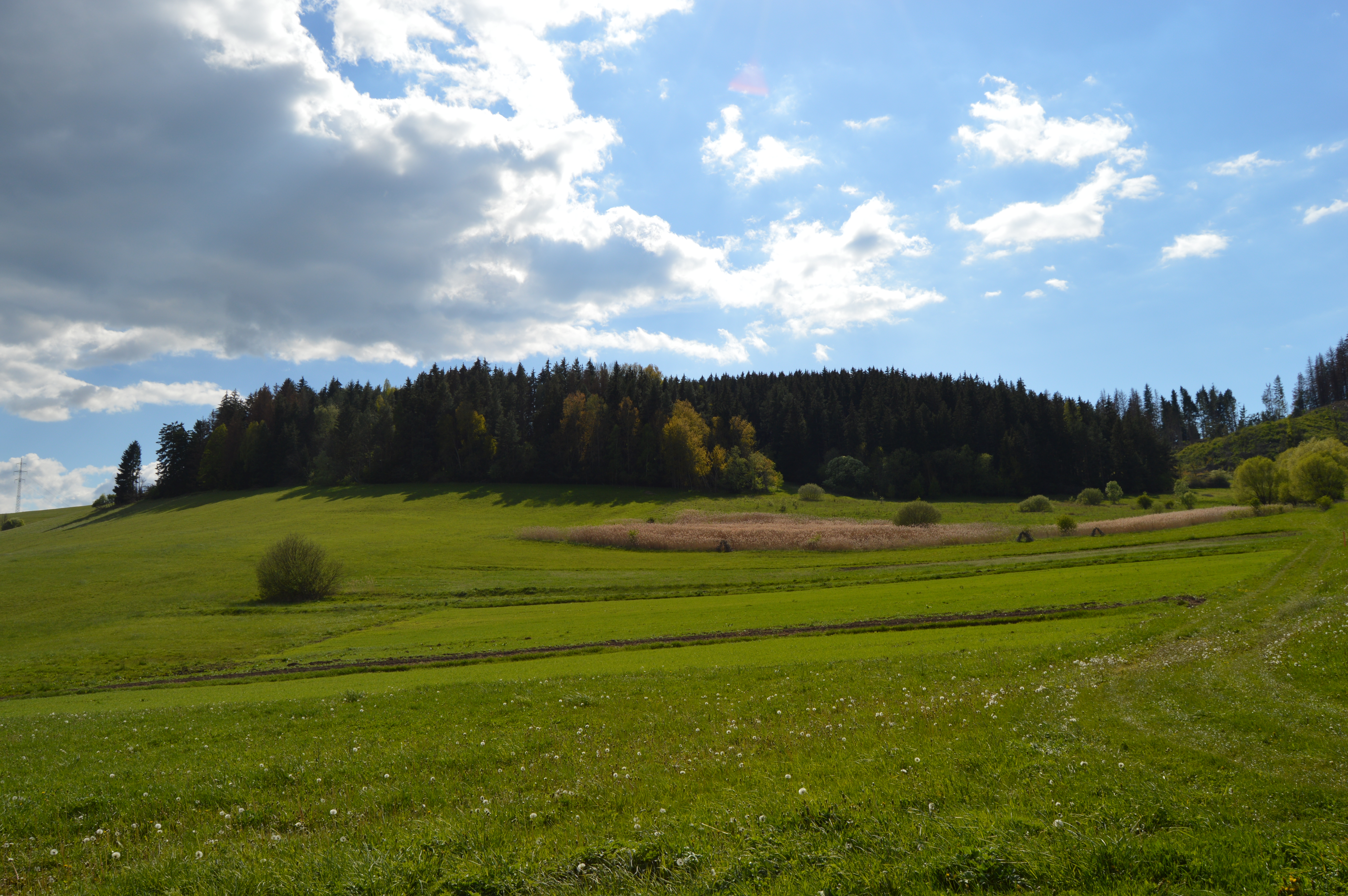 krajina